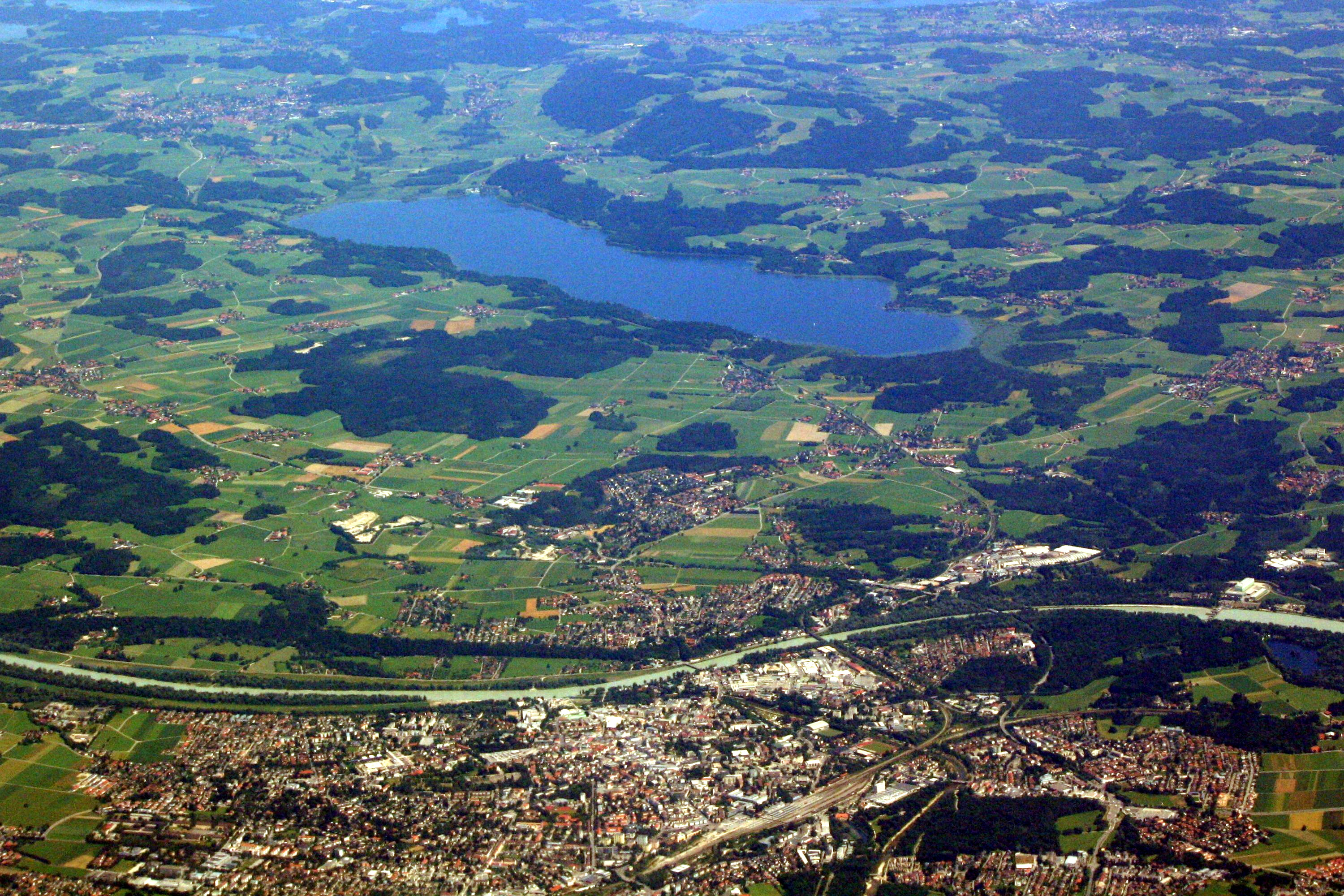 Luftbild Rosenheim